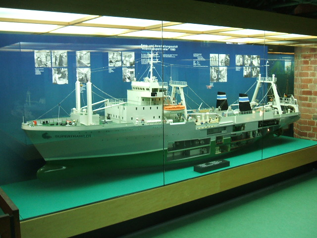 Modell eines Fischfang- und verarbeitungsschiffes vom Typ "Atlantik Supertrawlers" der Stralsunder Volkswerft im Meeresmuseum Stralsund